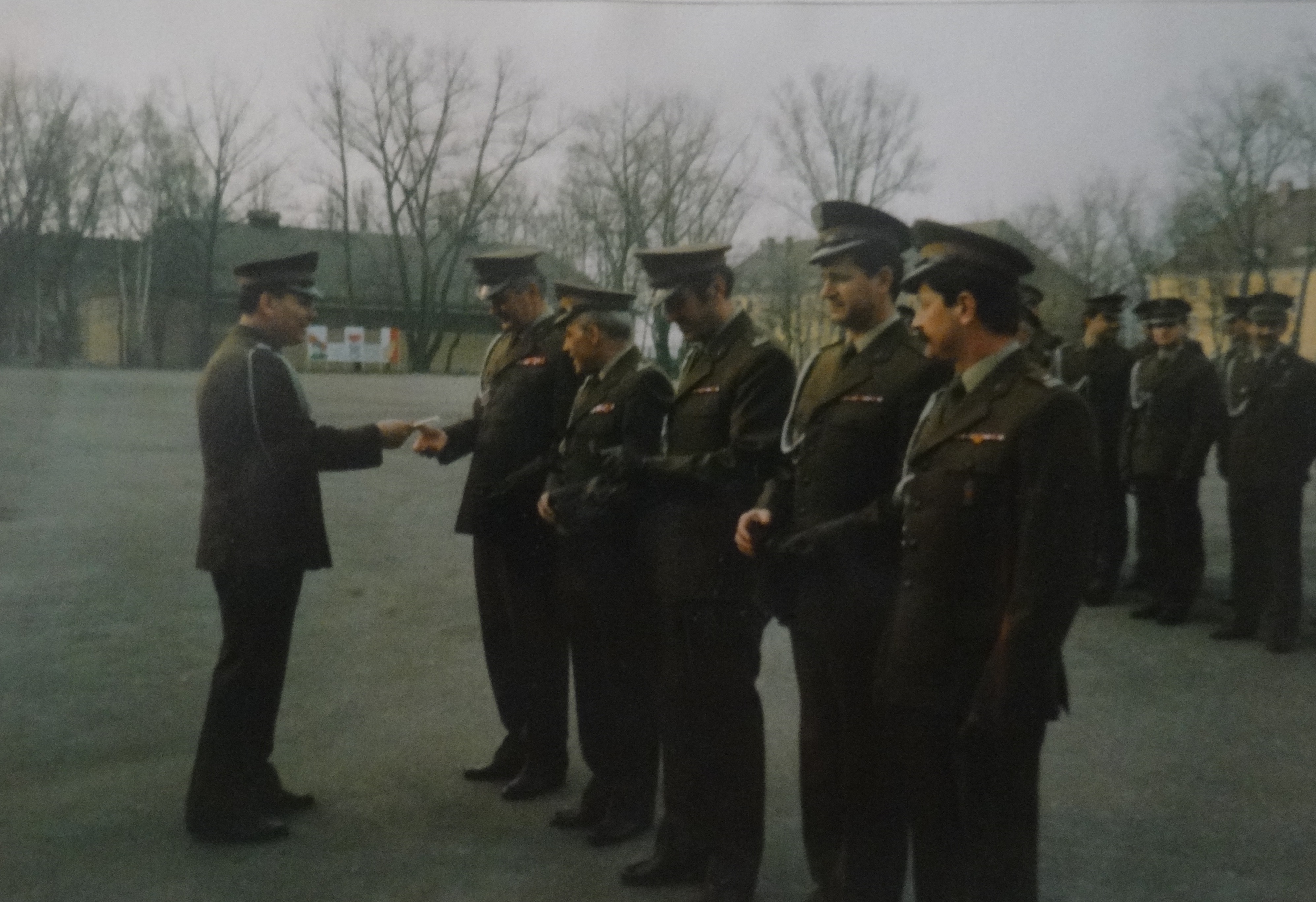 Dowódca 45 Batalionu Medycznego wręcza dla kadry jednostki pamiątkowe odznaki